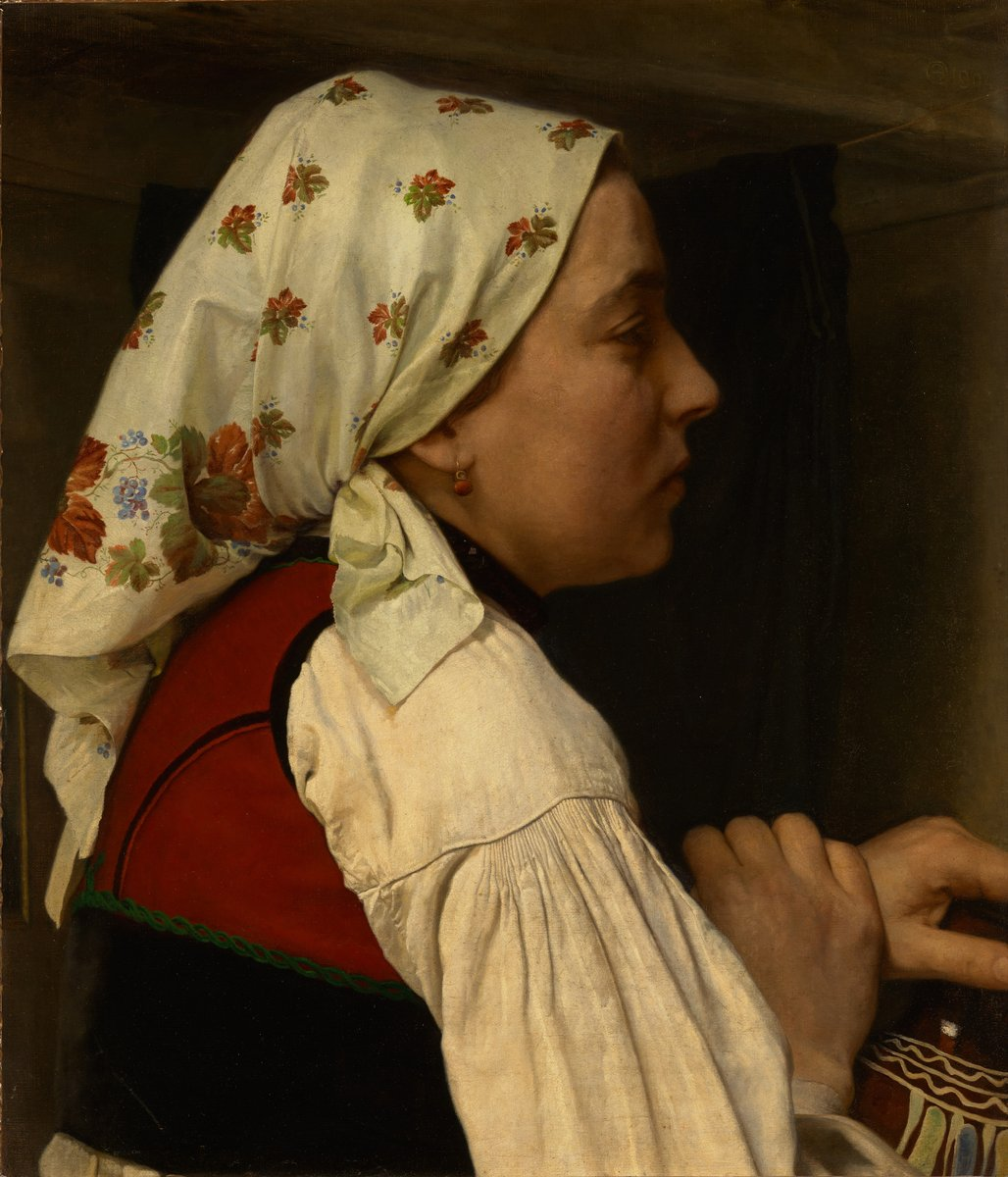 Arthur Coulin - Femeie din Secuime, ulei pe pânză, 1904, 52x44 cm., Galeria Naționala Maghiară, Budapesta